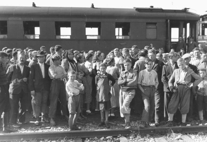 Umsiedler auf dem Bhf. Graz- Puntigam 27.- 28.11.1940